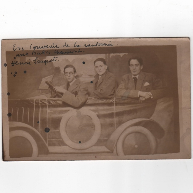 Photo prise chez un photographe dans un décor (fausse automobile). Pierre Lardin au milieu, Henri Sauguet au volant et Jacques Lardin son frère à l'arrière.